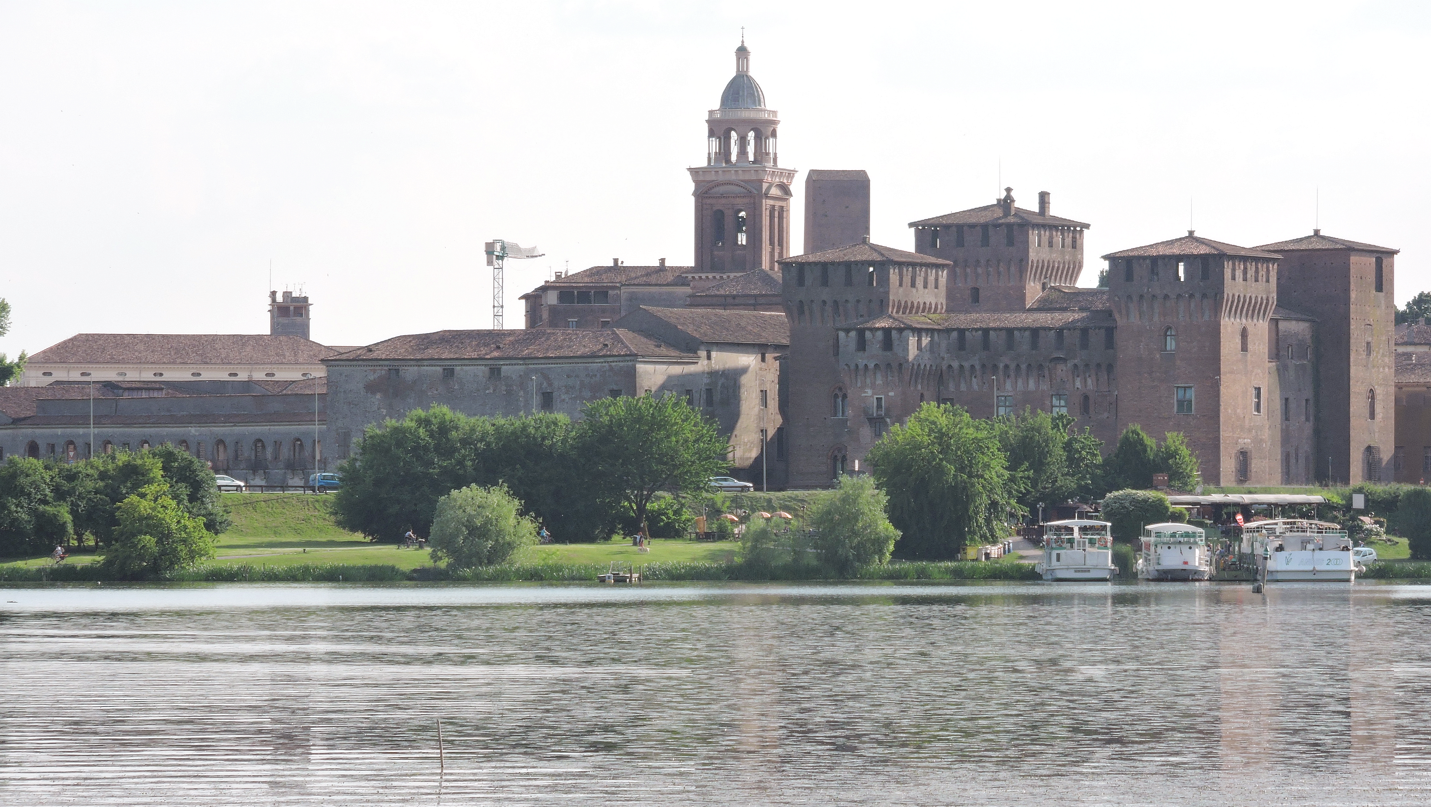 parco regionale del Mincio (Q3364637)